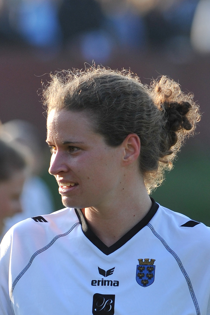 UEFA Women's Champions League 2013/14 SV Neulengbach - Tyresö FF Neulengbach, 29. März 2014 Nina Burger